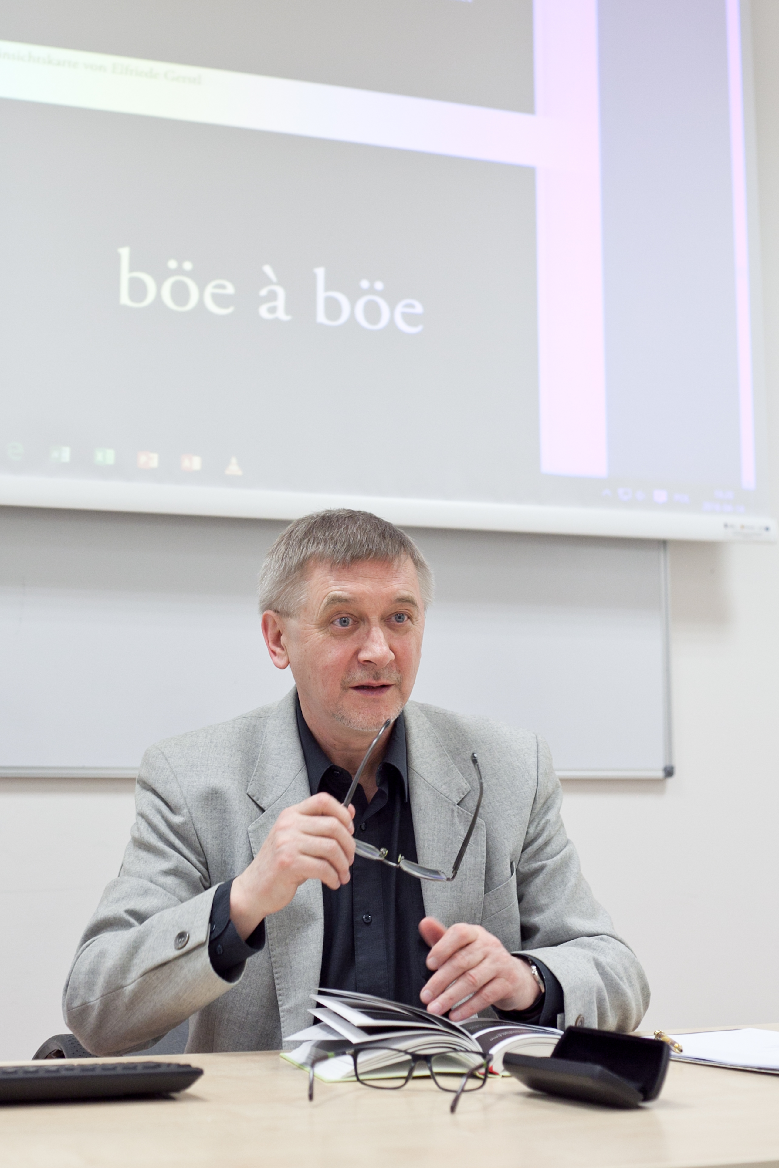 Ryszard Wojnakowski w Instytucie Filologii Germańskiej Uniwersytetu Jagiellońskiego, 2016 r.